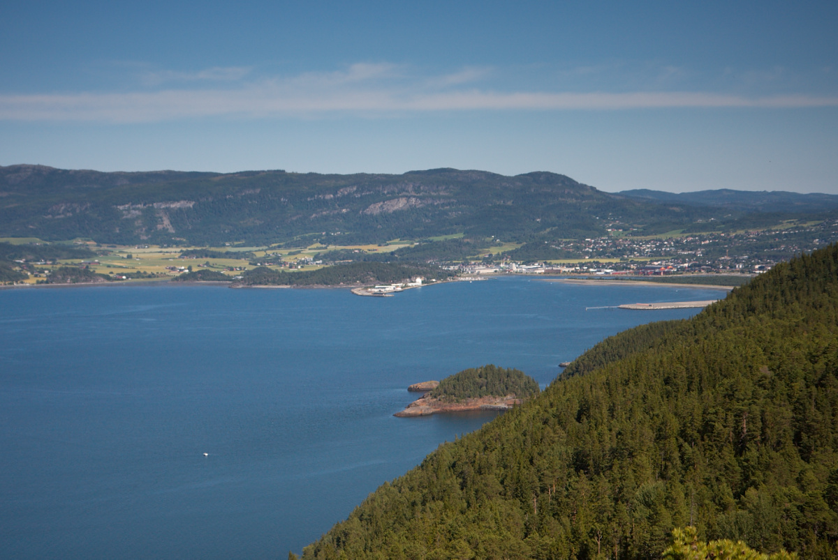 Mot Stjørdal. Vestre del av rullebanen på Trondheim Lufthamn Værnes stikk fram bak åsen til høgre.